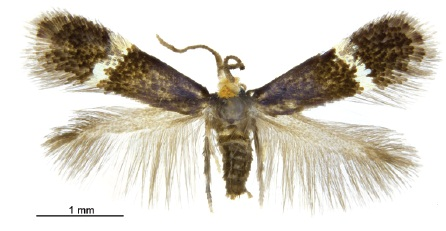 Pectinivalva brevipalpa